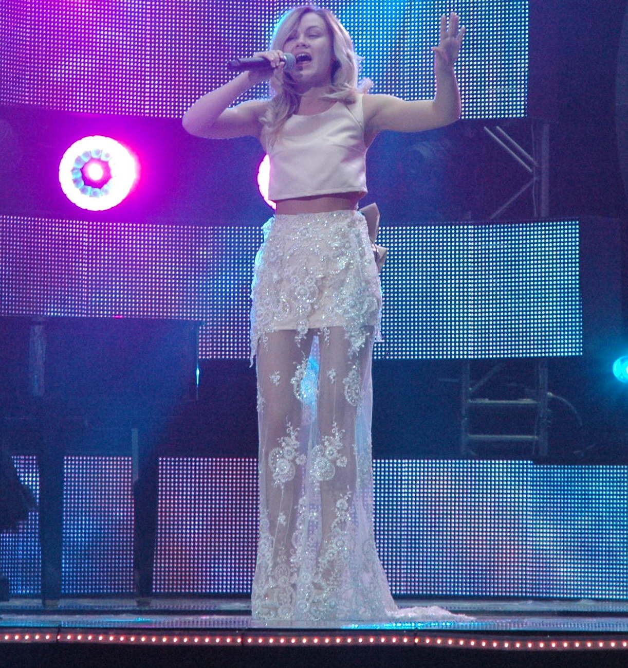 Napoli podczas prób do występu w finale Krajowych Eliminacjach do Konkursu Piosenki Eurowizji 2016.